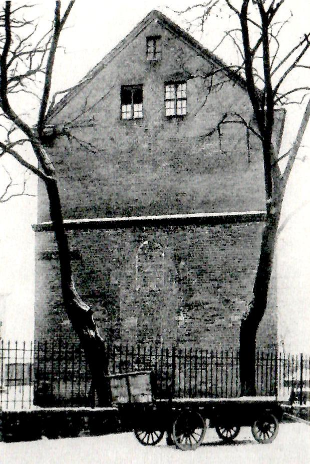 Erbaut im späten 14. Jahrhundert als Moritzkirche, ab 1806 militärisch genutzt, ab 1837 Mannschaftsquartier, 1920 abgerissen, Quelle: Hans-Herbert Möller: Die ehemalige Moritzkirche in Spandau. In: Jahrbuch für brandenburgische Landesgeschichte. 15. Band, Berlin 1962, S. 59–70, hier S. 61